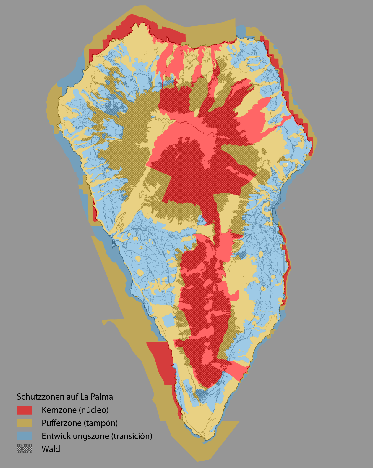 Karte der Zonierungen der Schutzgebiete auf La Palma